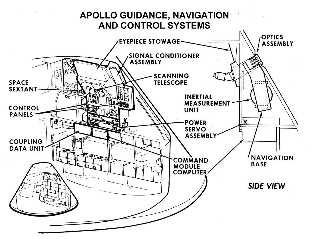 command module guidance and navigation equipment